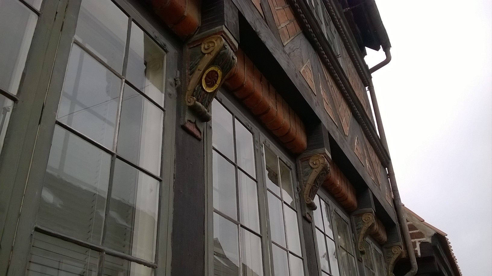 Knægt på Ridderhuset i Riddergade, Næstved